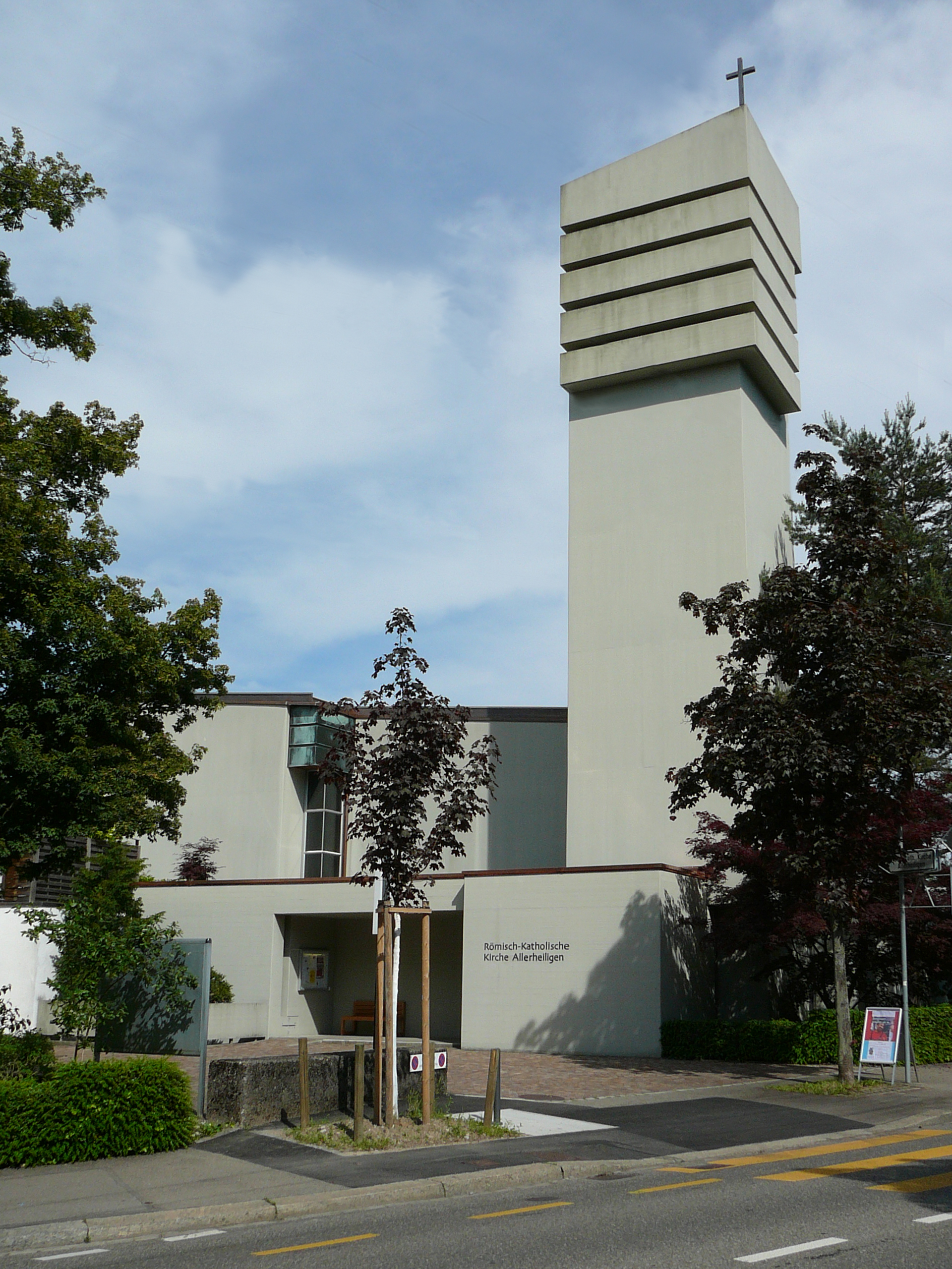 Römisch-katholische Pfarrkirche Allerheiligen, Ansicht von der Wehntalerstrasse aus